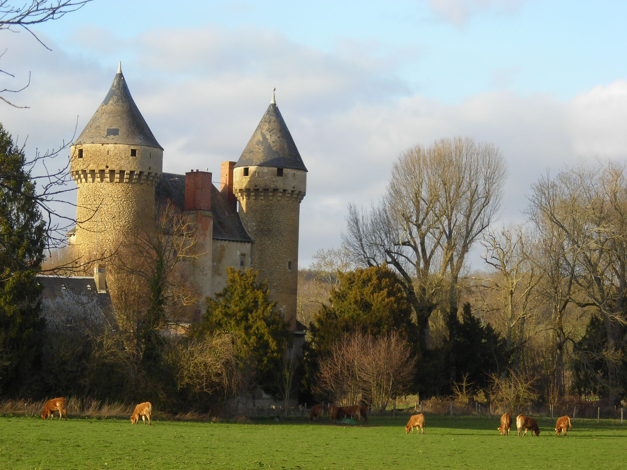 celon 36 tours 648745